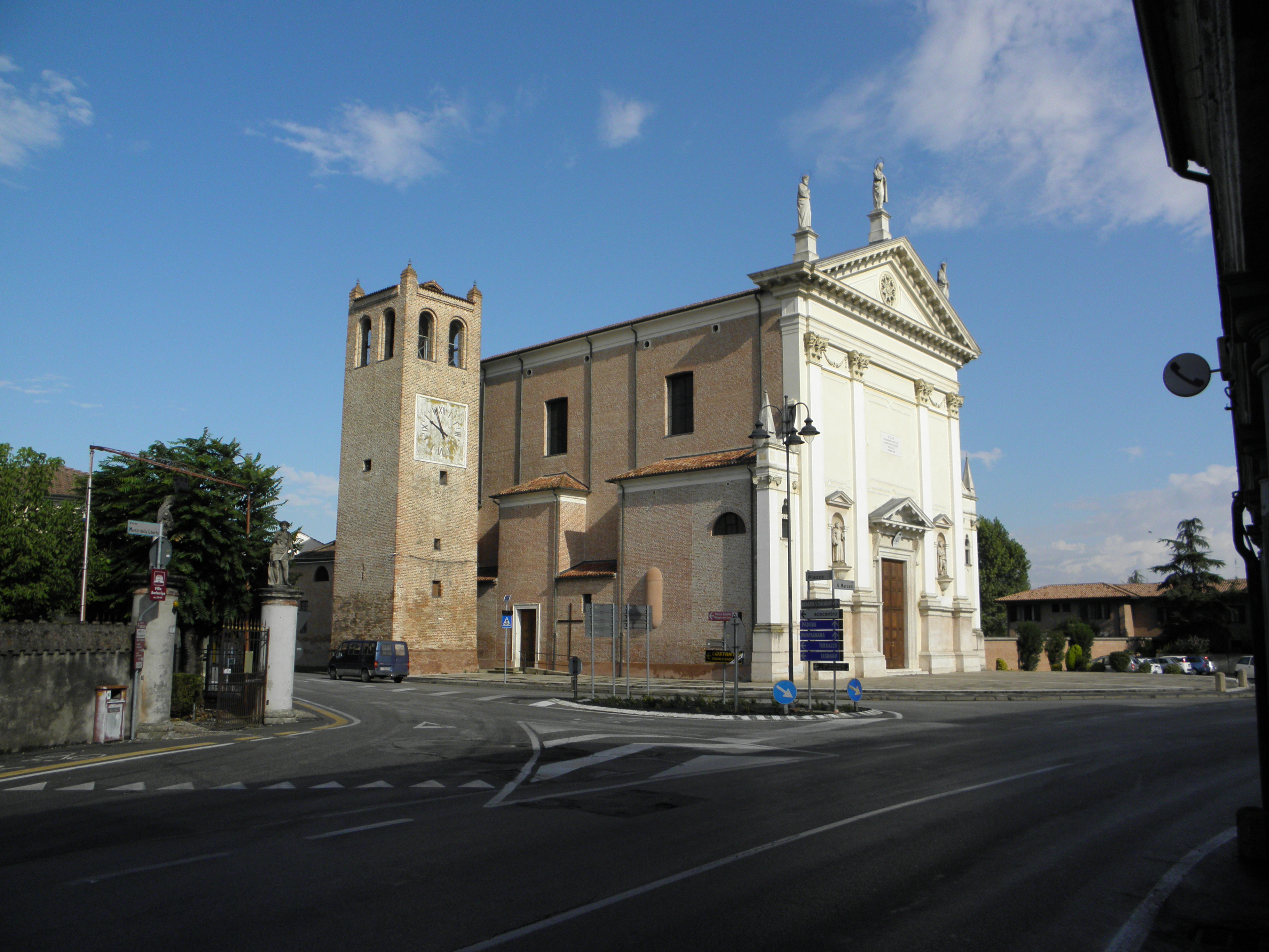 Merlara, chiesa parrocchiale della Natività della Beata Vergine Maria.